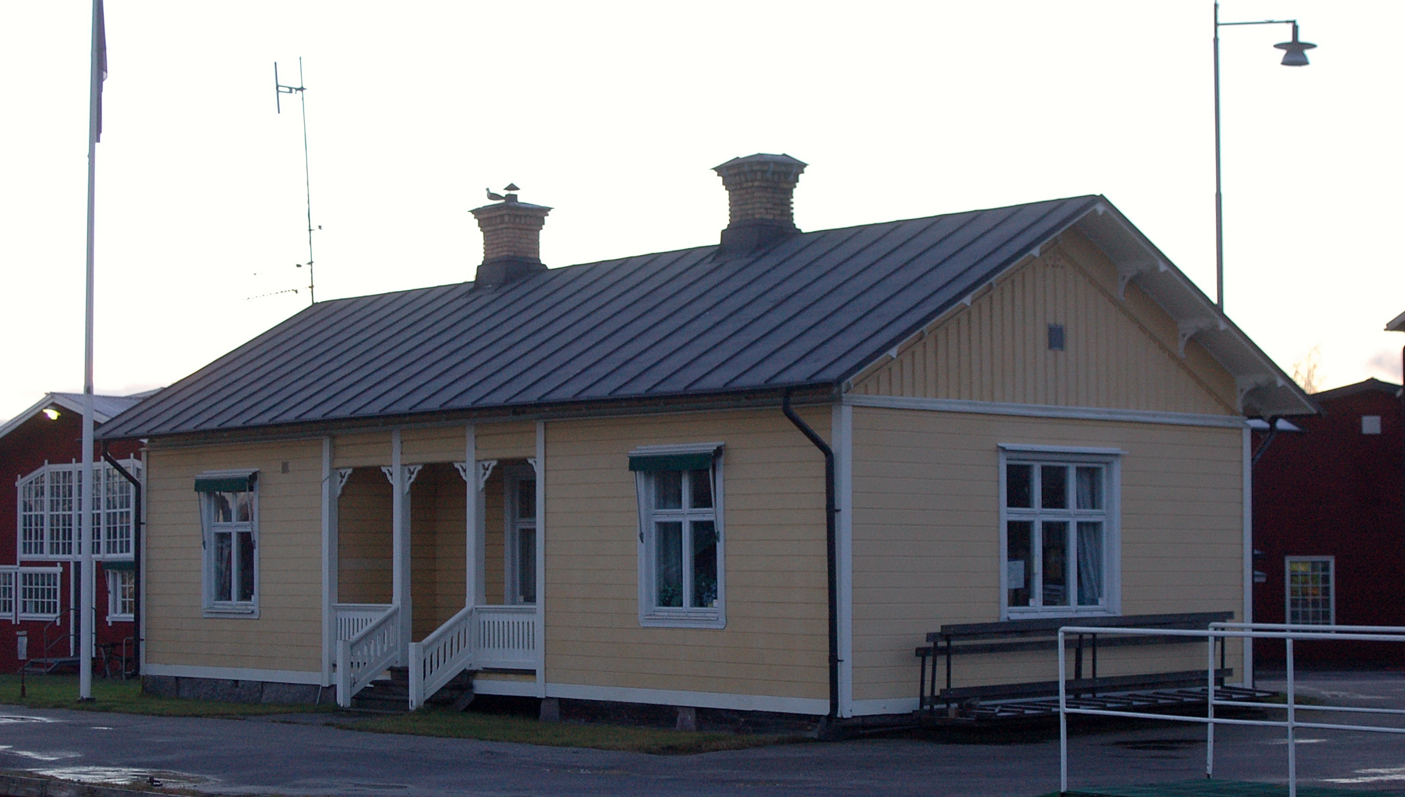 Varvskontoret vid SjötorpsVarf Docka och Ångsåg.